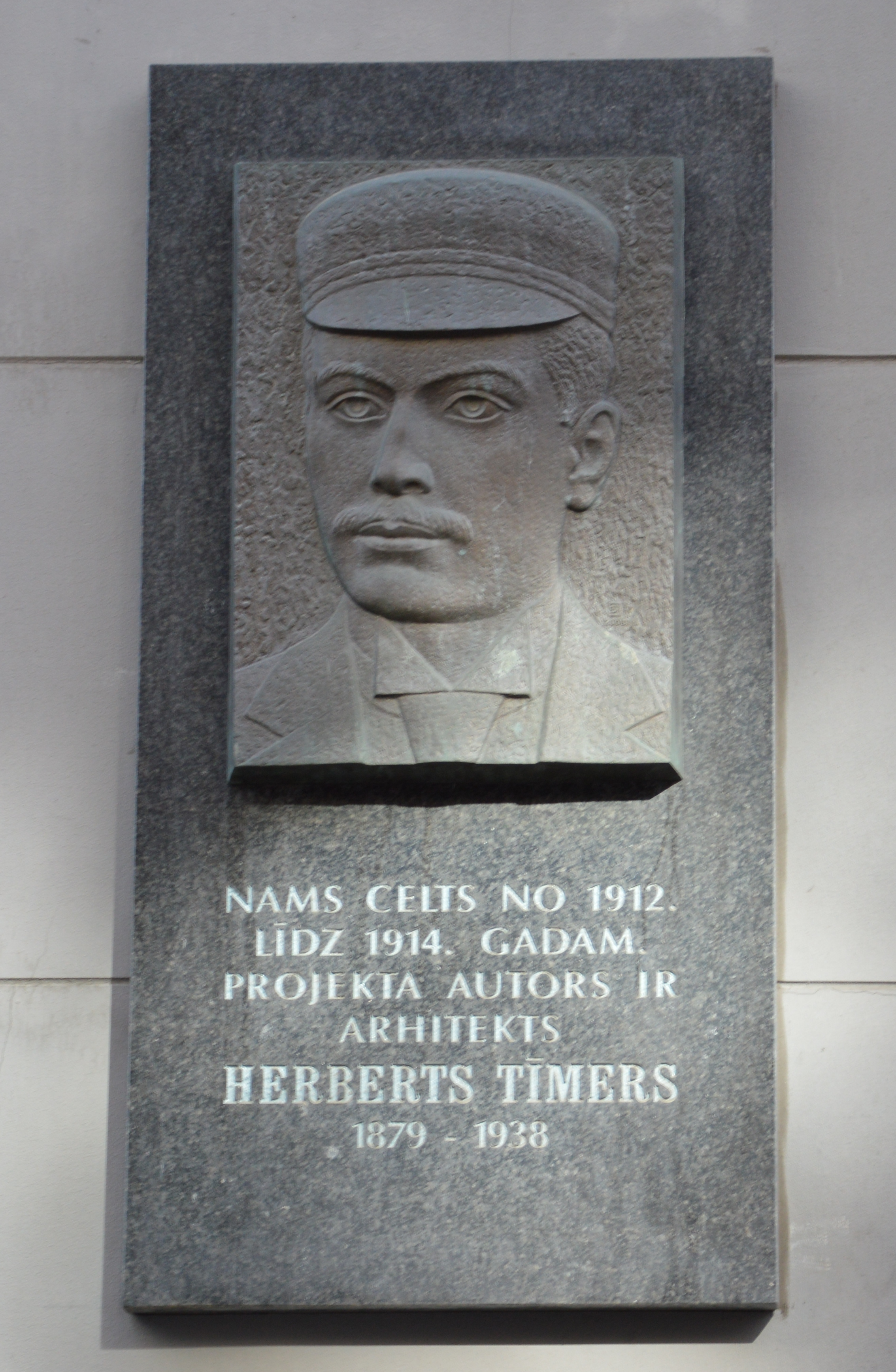 Gedenktafel Herbert Tiemer Riga